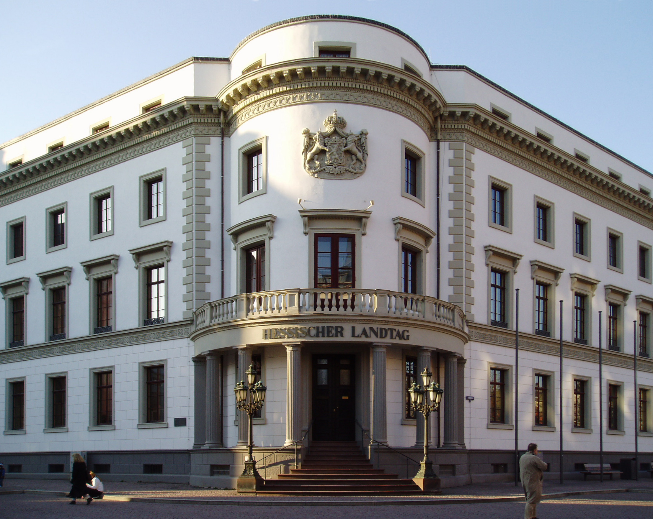 Das Bild zeigt die markante Ecke des 1841 erbauten nassauischen Stadtschlosses in Wiesbaden. Aufgenommen vom Schloßplatz aus. Variante von File:EckeStadtschlossWI.jpg